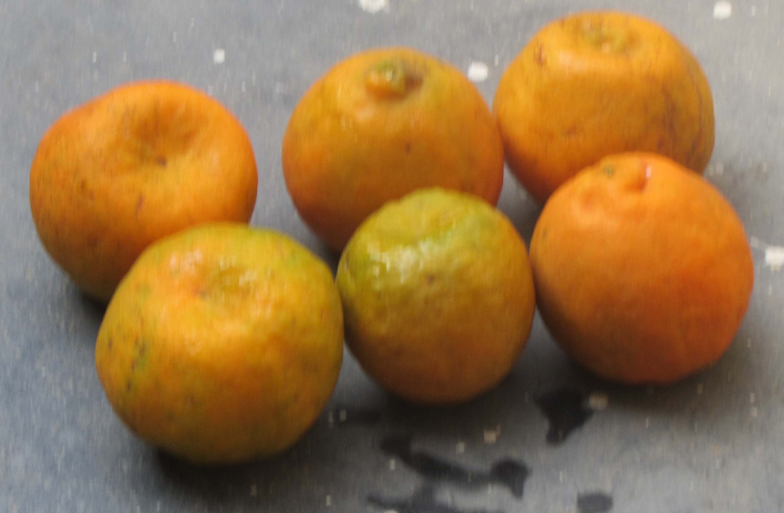 ஆரஞ்சு, ஆரஞ்சுப்பழம், இனிப்பு கலந்த ஆரஞ்சு. - own shot